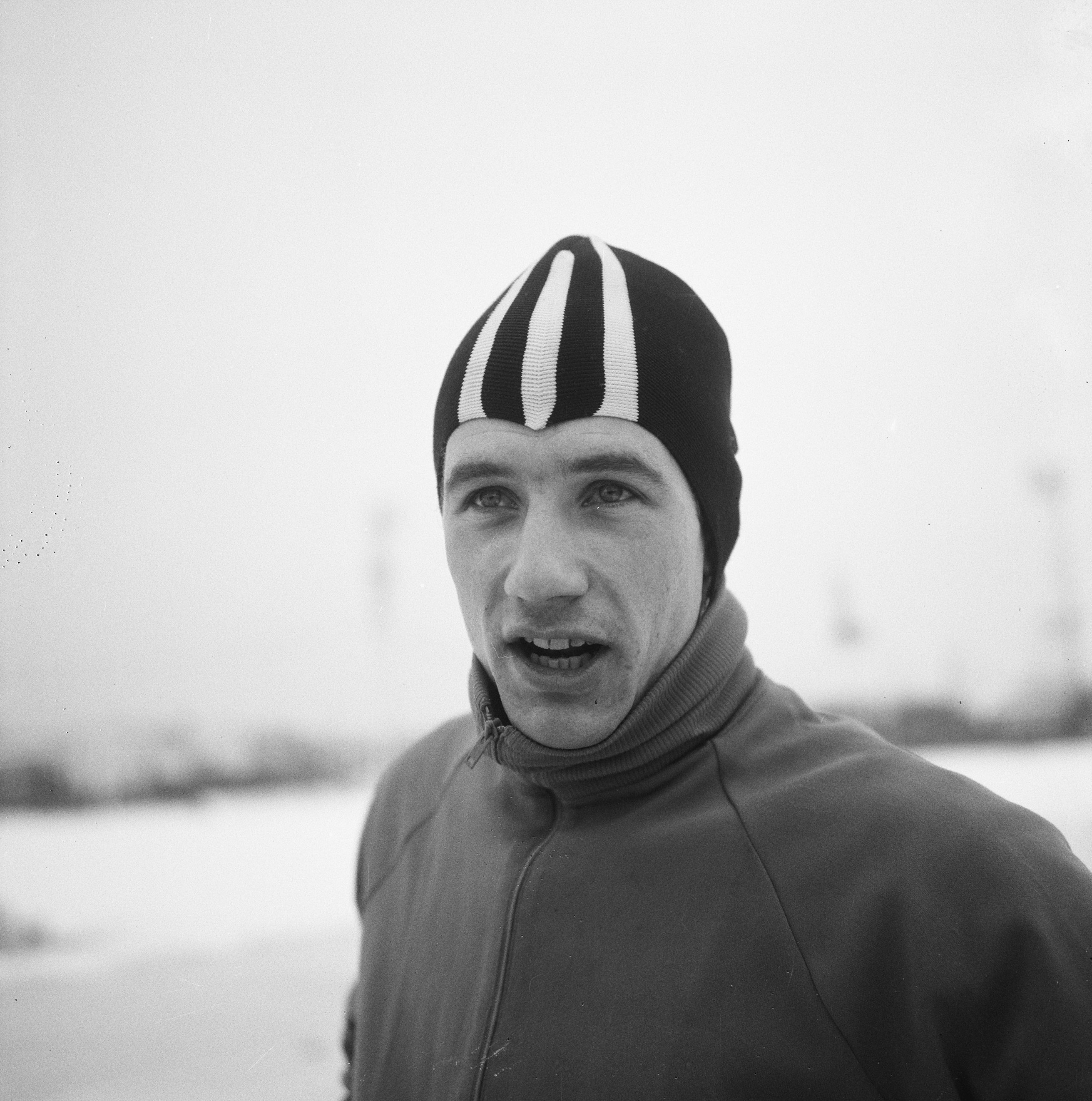 Collectie / Archief : Fotocollectie Anefo Reportage / Serie : Nederlandse kampioenschappen schaatsen 1967 op de Jaap Edenbaan Beschrijving : Kees Verkerk Datum : 7 januari 1967 Locatie : Amsterdam Trefwoorden : schaatsen Persoonsnaam : Verkerk, Kees Fotograaf : Nijs, Jac. de / Anefo Auteursrechthebbende : Nationaal Archief Materiaalsoort : Negatief (zwart/wit) Nummer archiefinventaris : bekijk toegang 2.24.01.03 Bestanddeelnummer : 919-9518